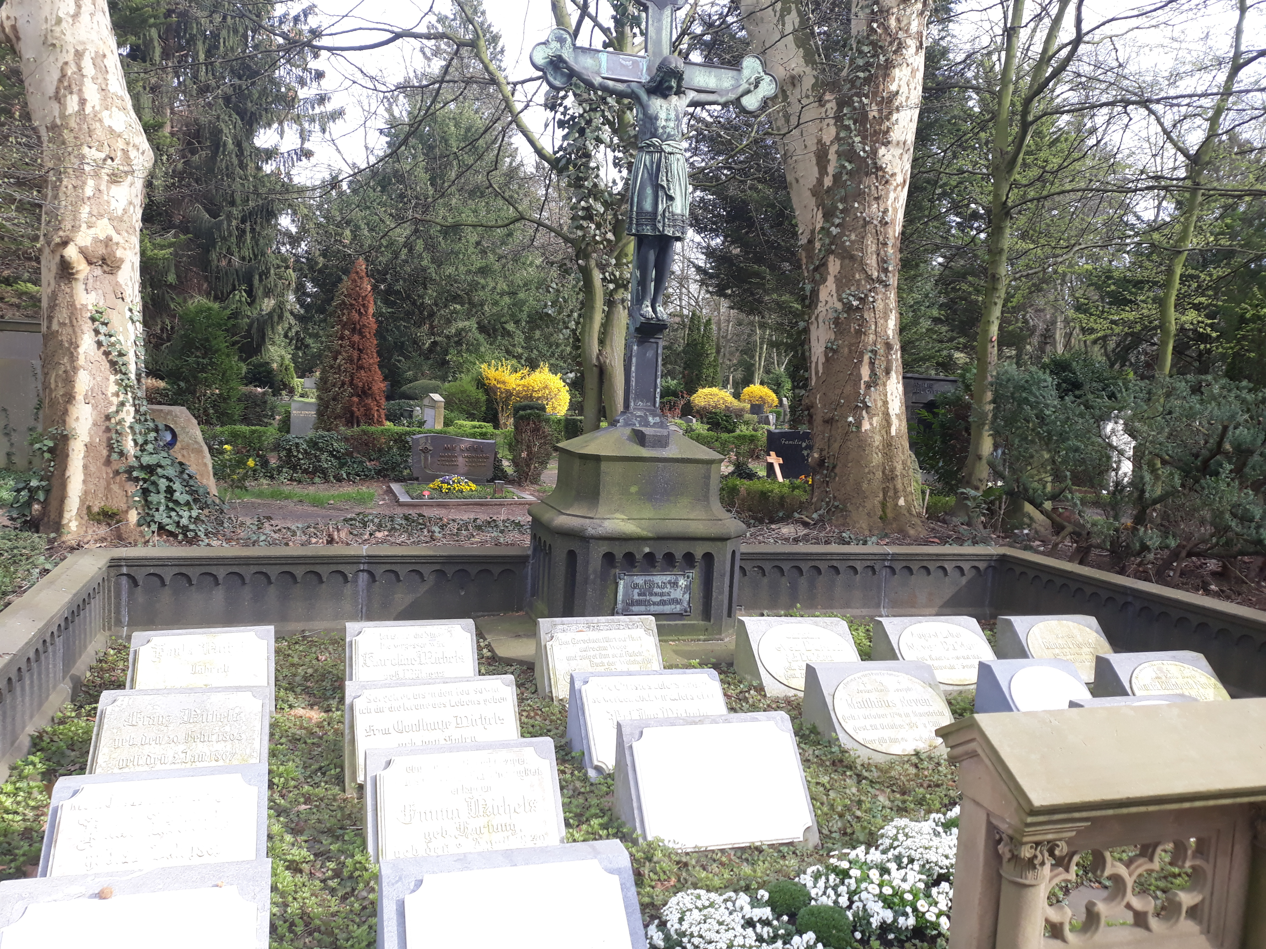 Das Grab des Tabakhändlers Mathieu Neven im Familiengrab mit Familie Michels auf dem Friedhof Melaten in Köln.